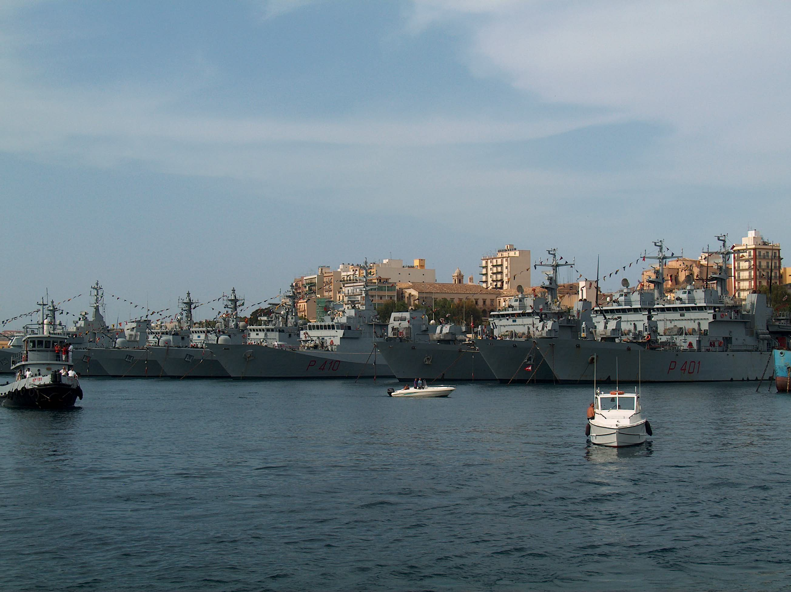 Il molo torpediniere di Augusta, con attraccati vari pattugliatori delle classi Comandanti e Cassiopea I e II, e varie corvette della classe Minerva; in evidenza i pattugliatori Orione (P 410) e Cassiopea (P 401)